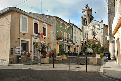 Autignac (Hérault) - Place du village, avec la mairie et l'église Saint-Martin